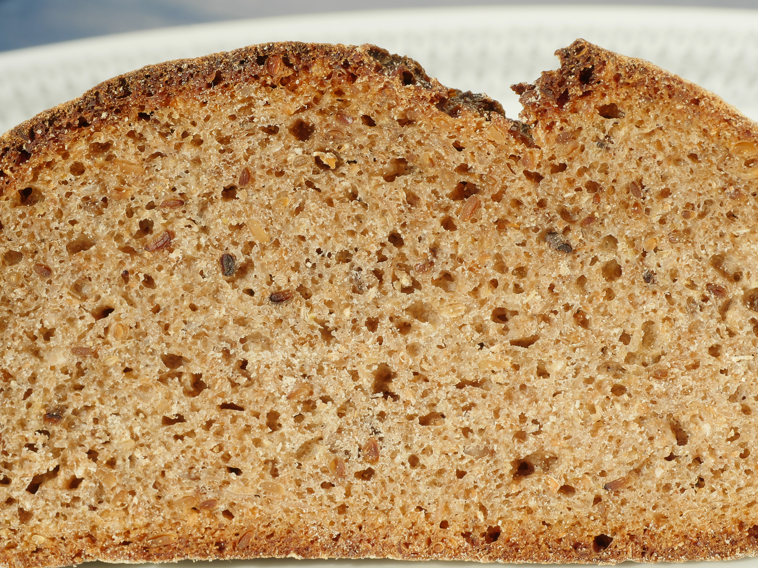 Kruste, Ausbund und Krume mit Poren beim Endstück eines Roggenvollkornbrots.